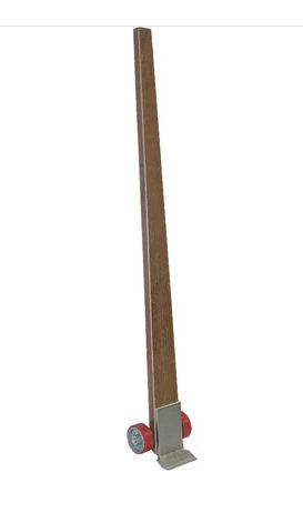 pry lever bar